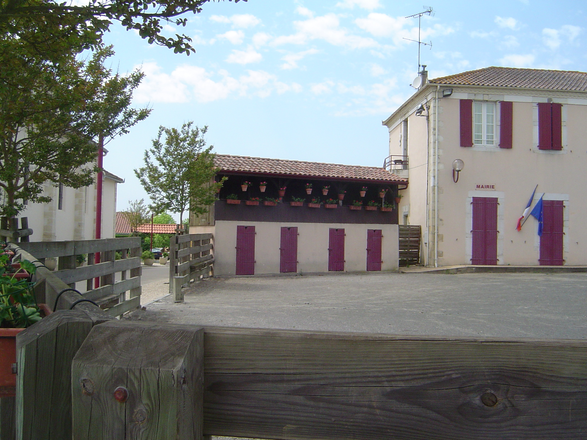 Arenas de Sèrraslos e Arribans ; Gasconha